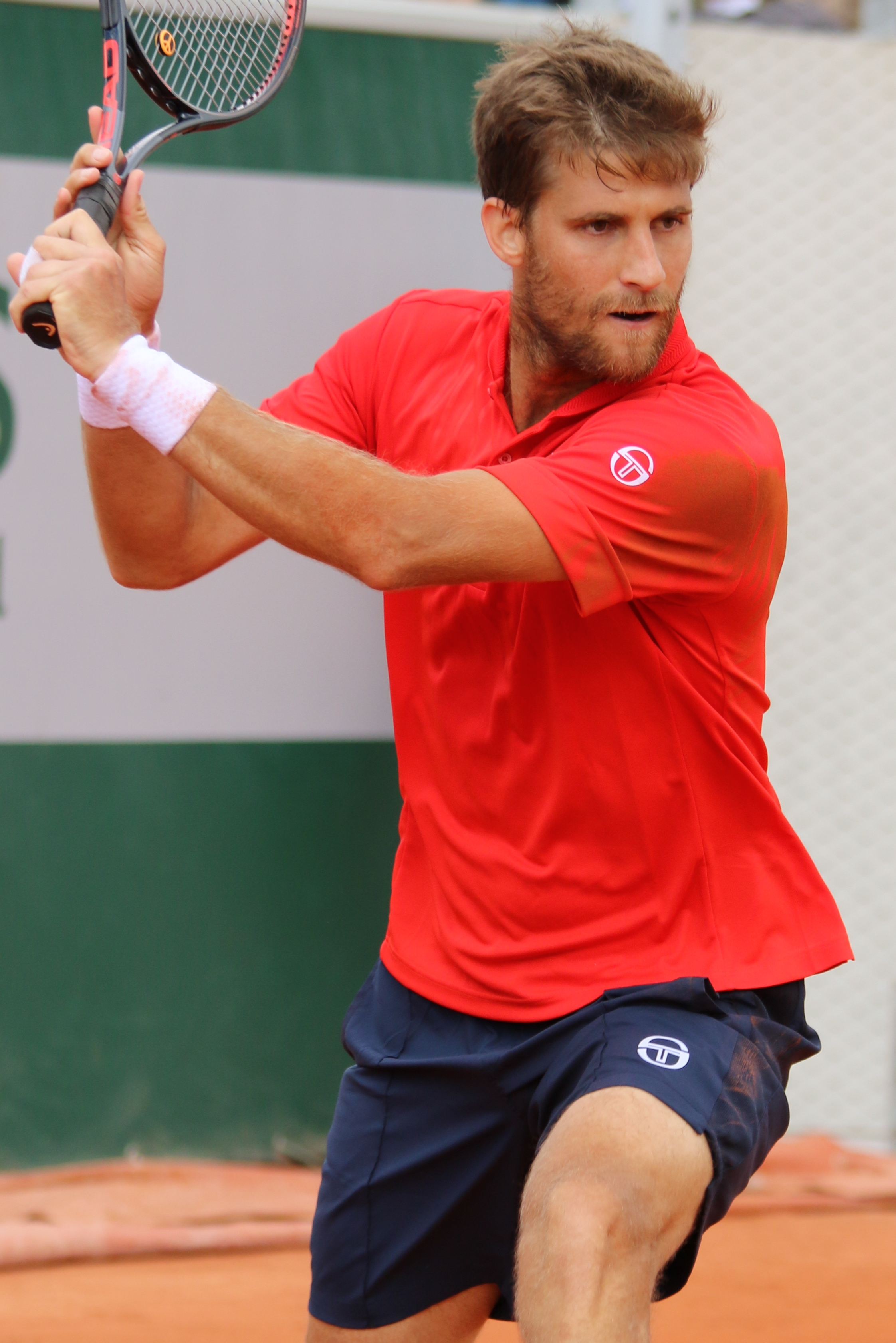 Klizan RG19 (31)